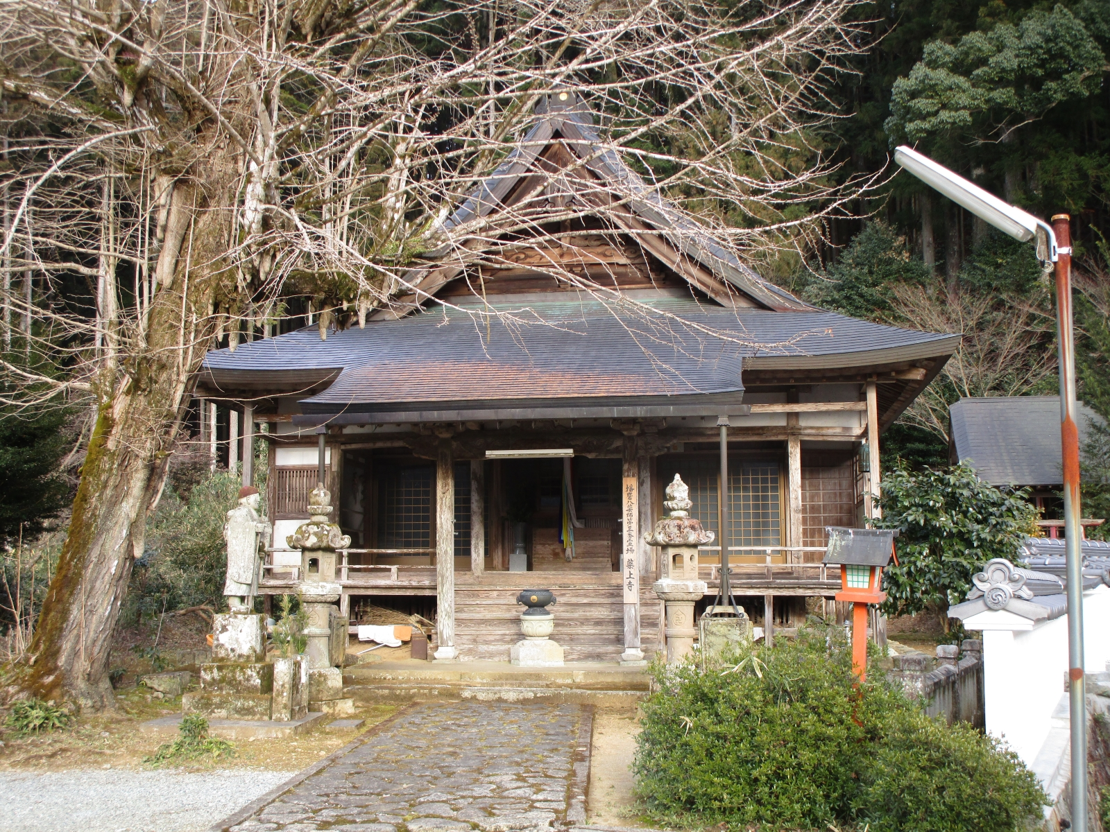 薬上寺 本堂